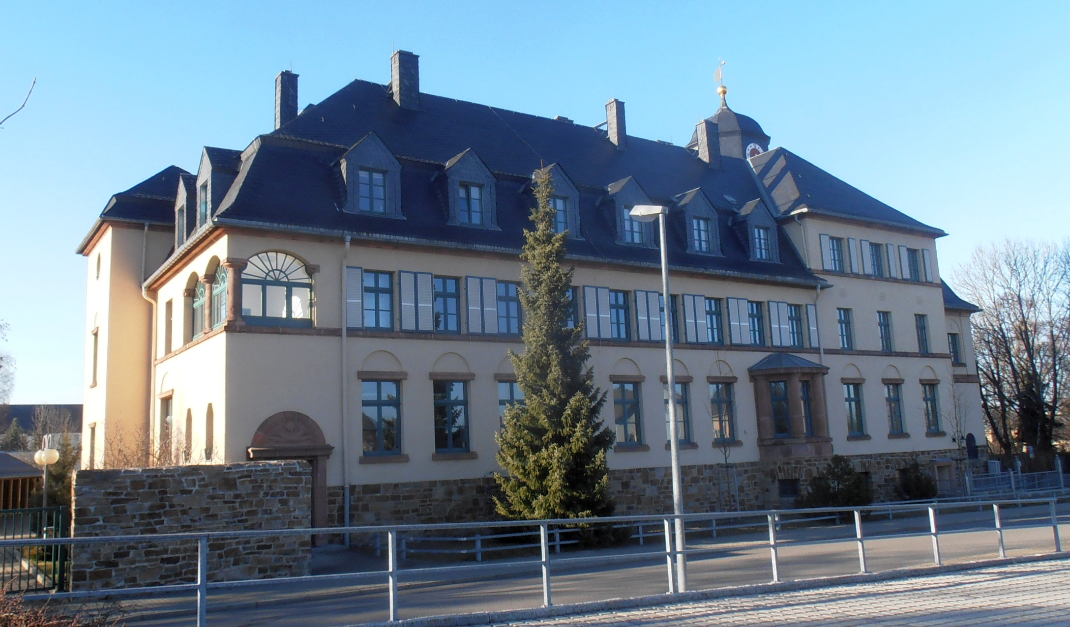 Das Amtsgericht in Marienberg im Erzgebirge, Blick von SW